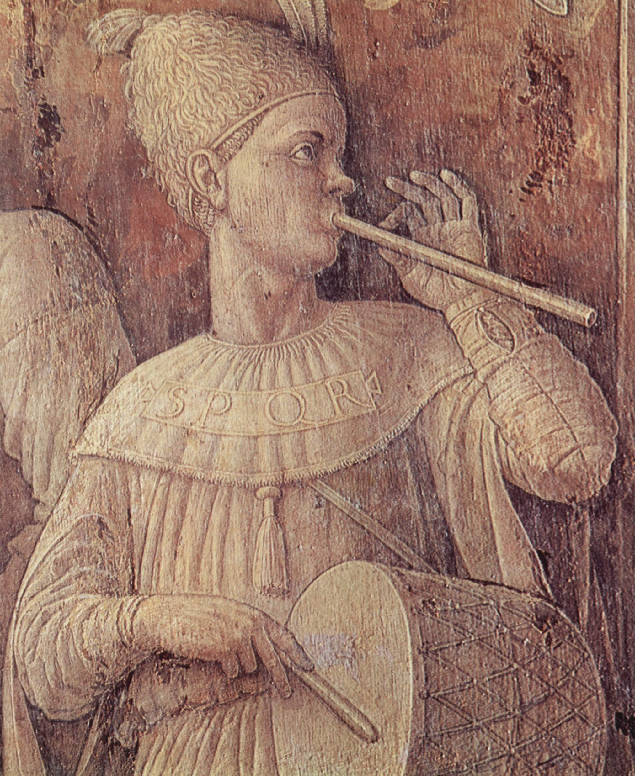 detail